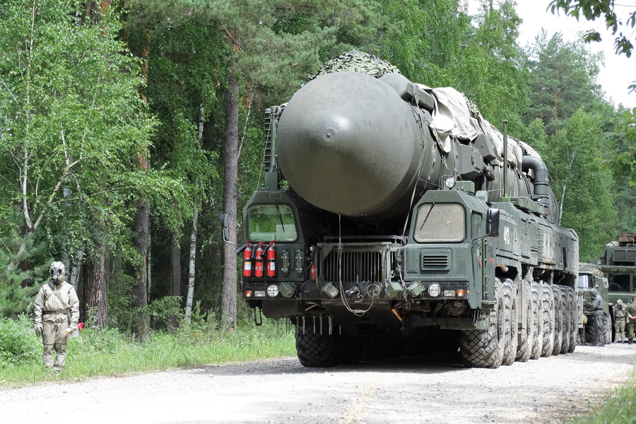 Финальный этап конкурса РВСН «Стратегическое многоборье» (Ивановская область).